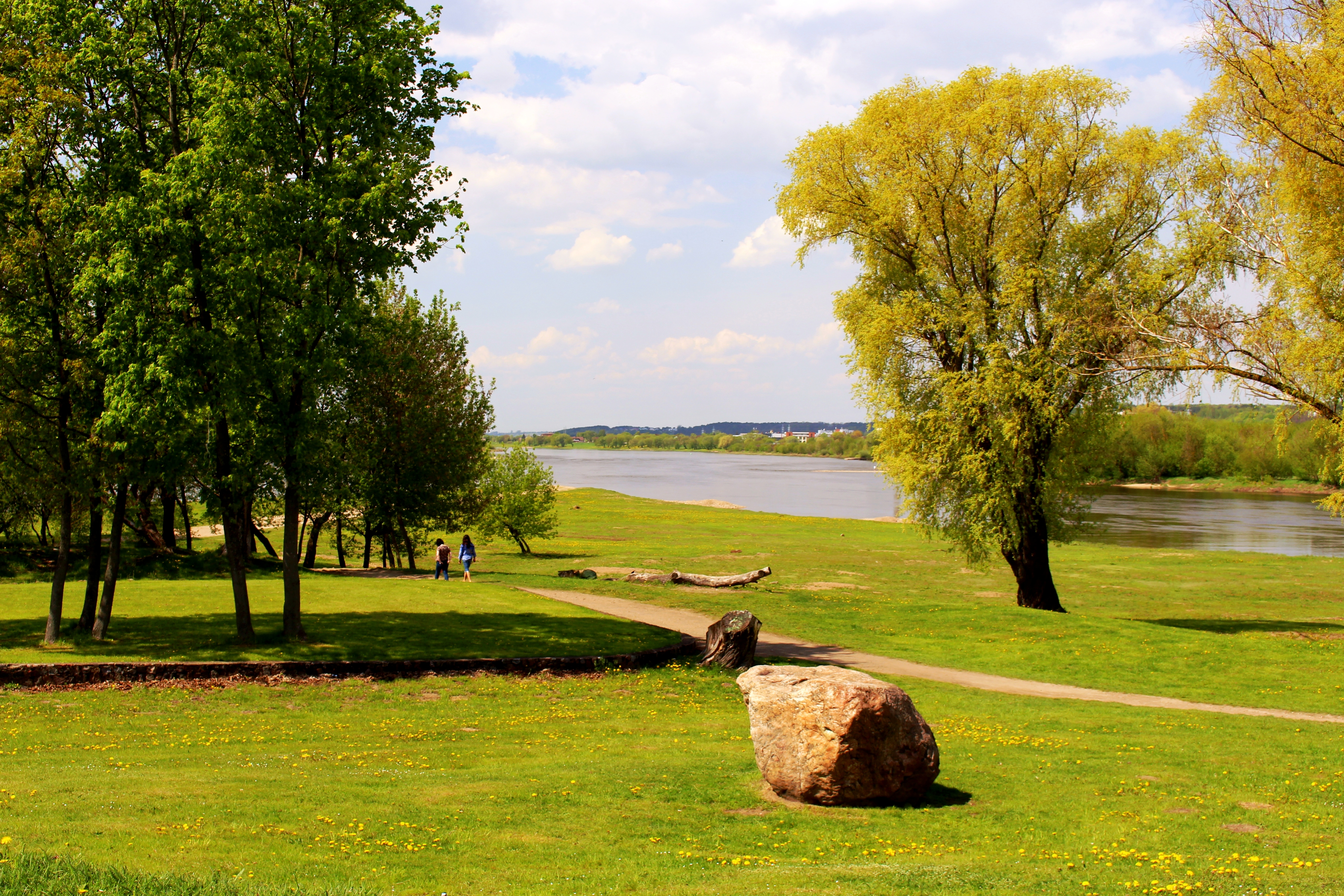 Neries delta